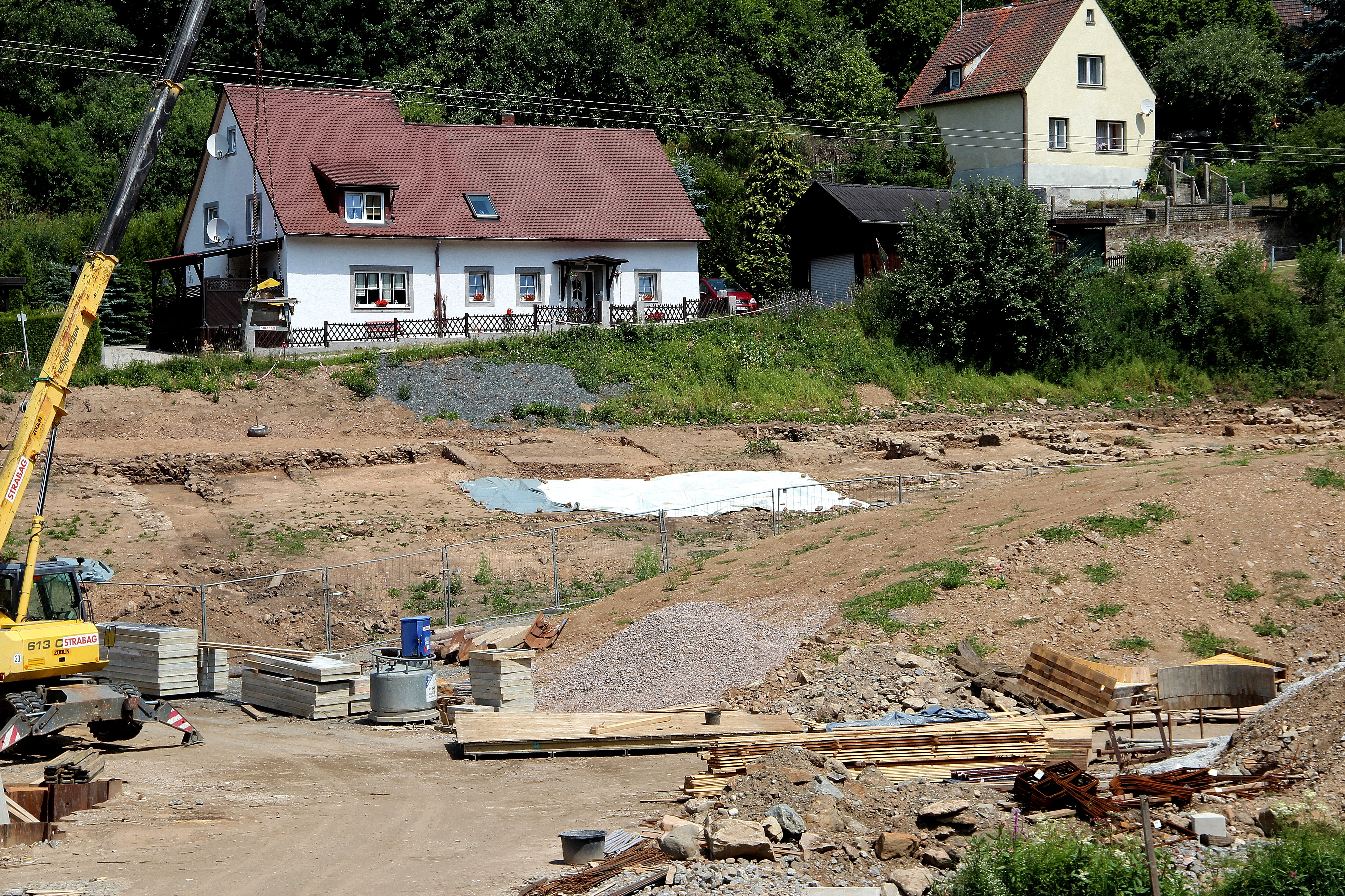 Kaltenthal an der Pfreimd, Ausgrabungen Hammer Kaltenthal im Jahre 2012: Gemeinde Trausnitz, Landkreis Schwandorf, Oberpfalz, Bayern (2012)